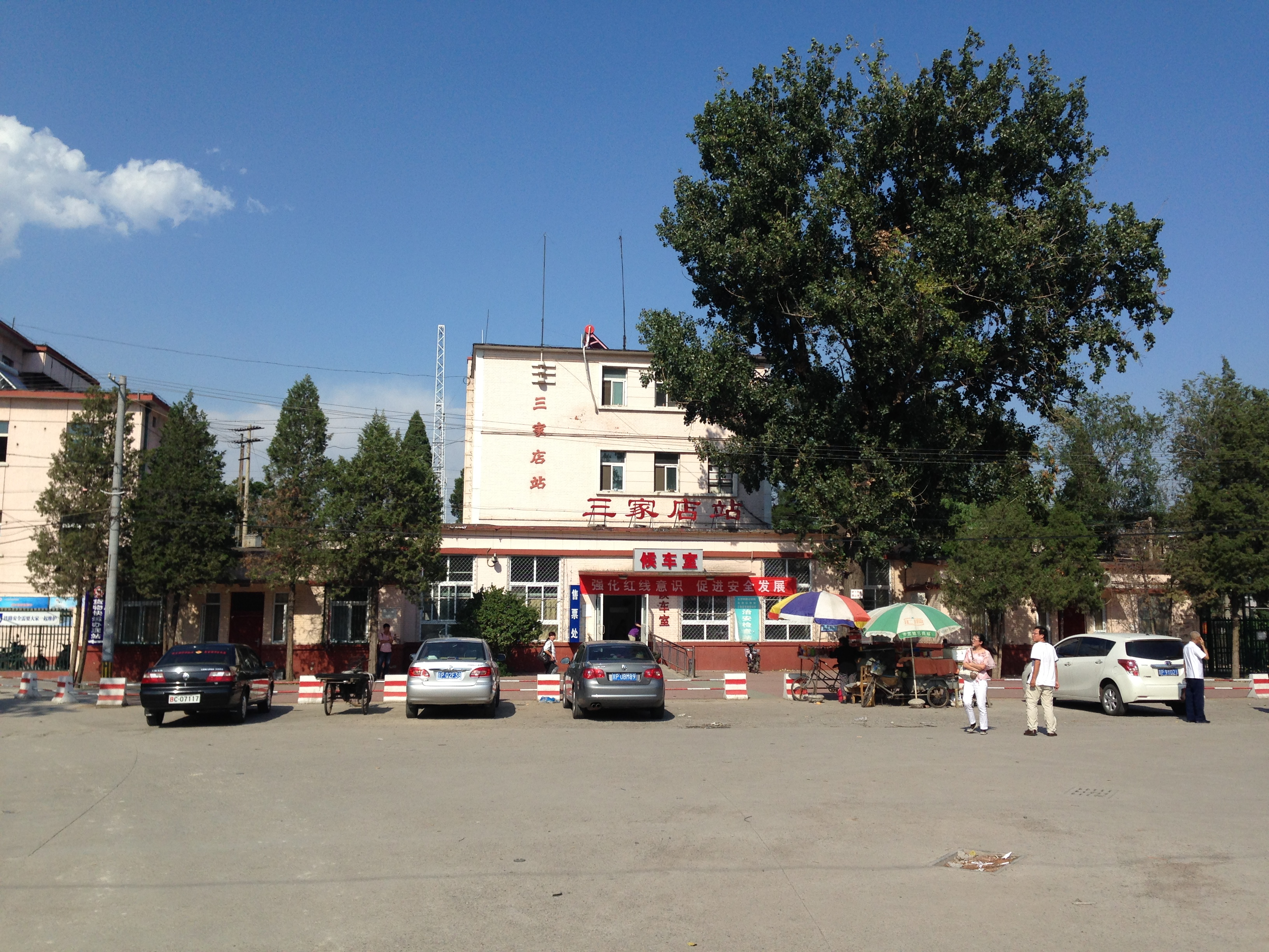 三家店站站房